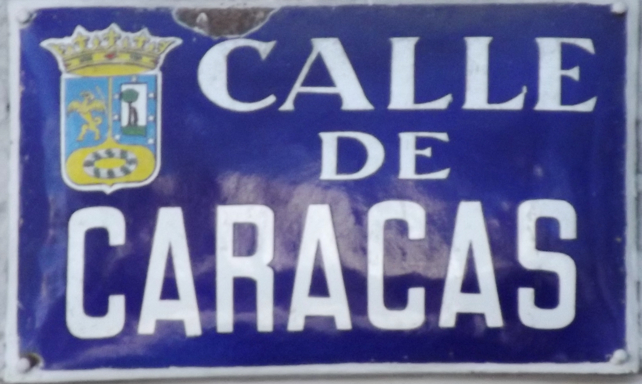 Placa de la calle de Caracas